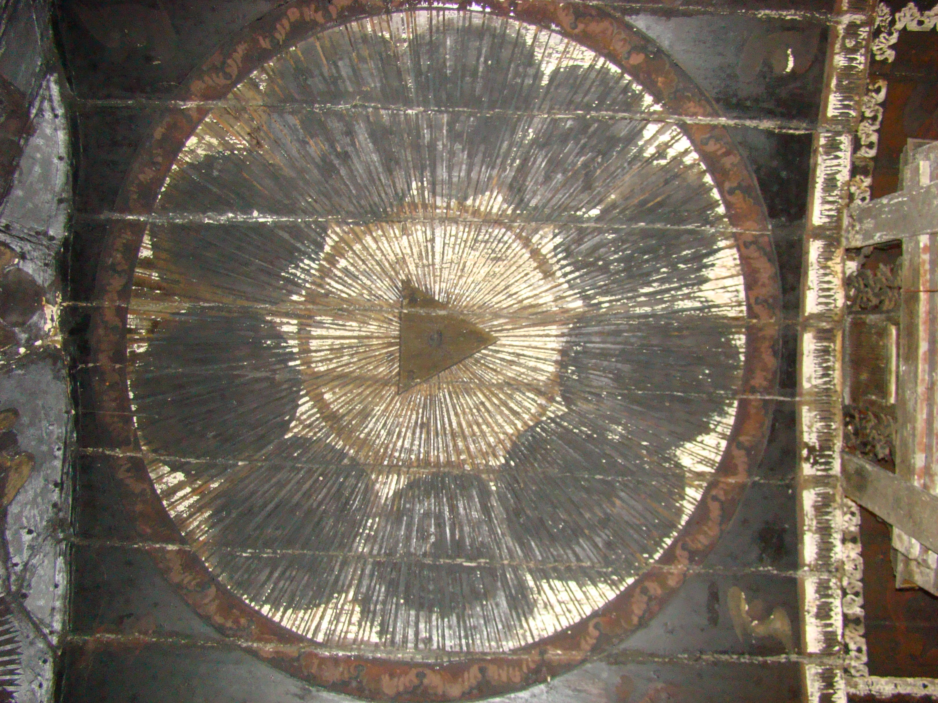 Biserica „Sf. Arhangheli Mihail și Gavriil” din Răstoci”, județul Sălaj